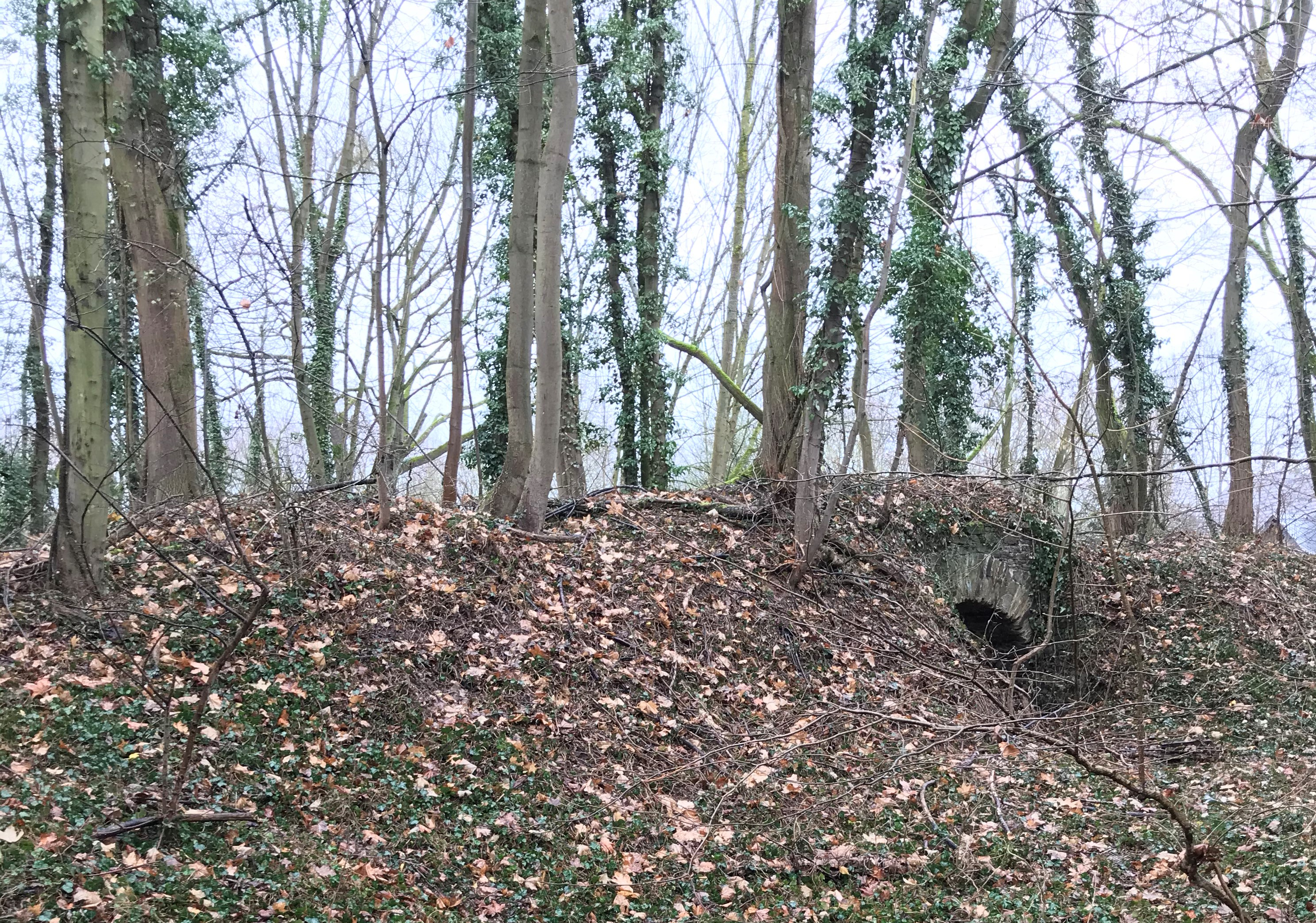 Überreste des Flankenwerk links, da zunächst bis 1871 noch als Flankenturm ausgeführt war